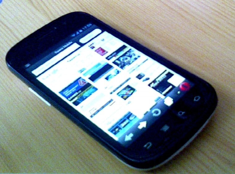 Ukázka Opera Mobile na telefonu Nexus S